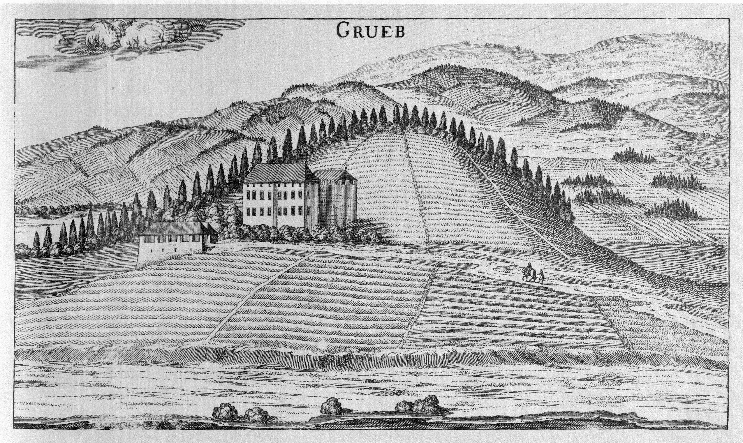 G. M. Vischers Käyserlichen Geographi, Topographia Ducatus Stiriae, Das ist: Eigentliche Delineation / und Abbildung aller Städte / Schlösser / Marcktfleck / Lustgärten / Probsteyen / Stiffter / Clöster und Kirchen / so es sich im Herzogthumb Steyrmarck befinden; Und anjetzo Umb einen billichen Preyß zu finden seynd Bey Johann Bitsch Universitäts Buchhandlern / Auff dem Juden=Platz bey der guldenen Saulen. Graz 1681 Die Nummerierung der Dateien folgt der alphabetischen Reihung der Ortsnamen